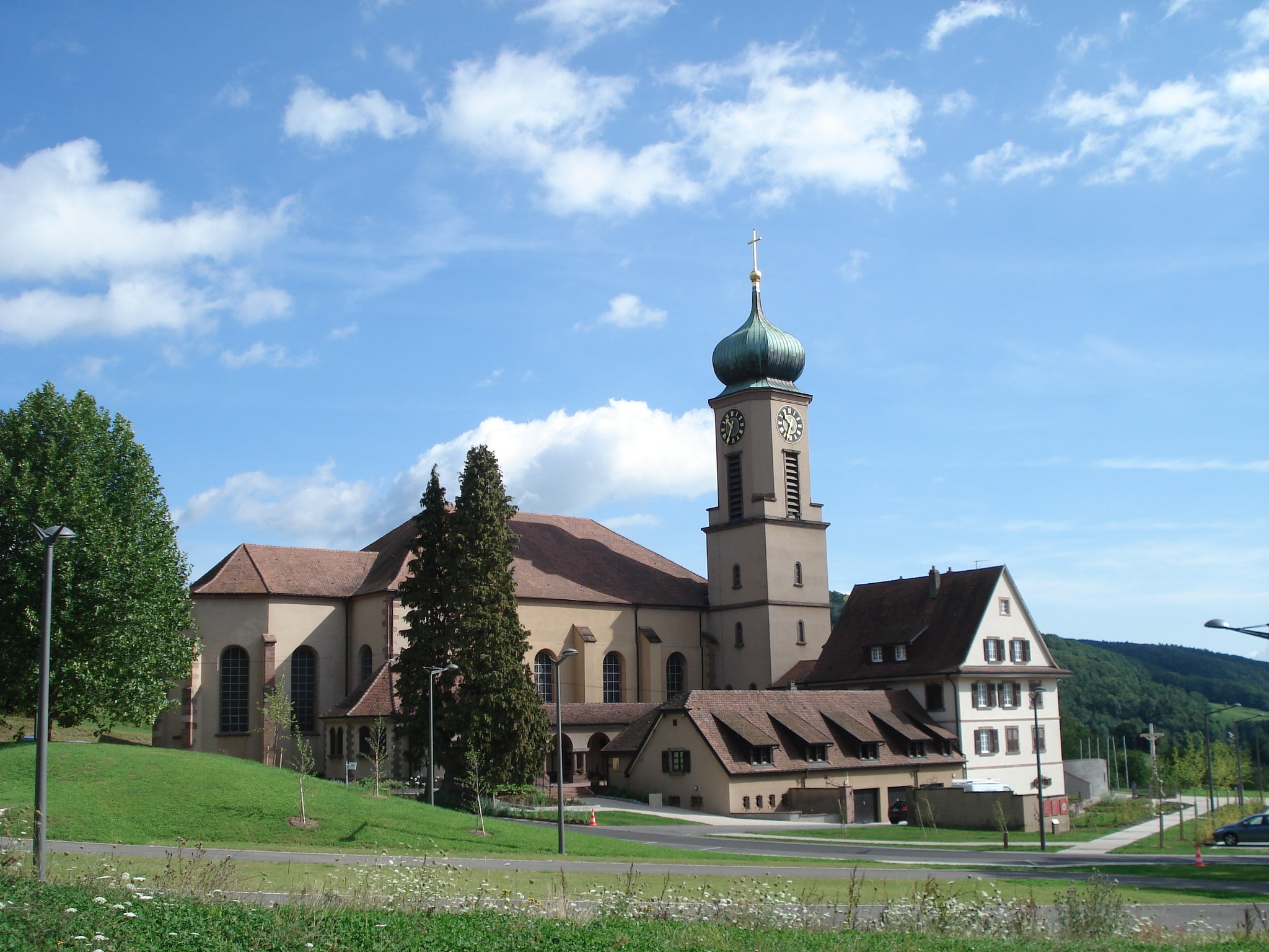 Thierenbach : Basilique vue générale coté choeur